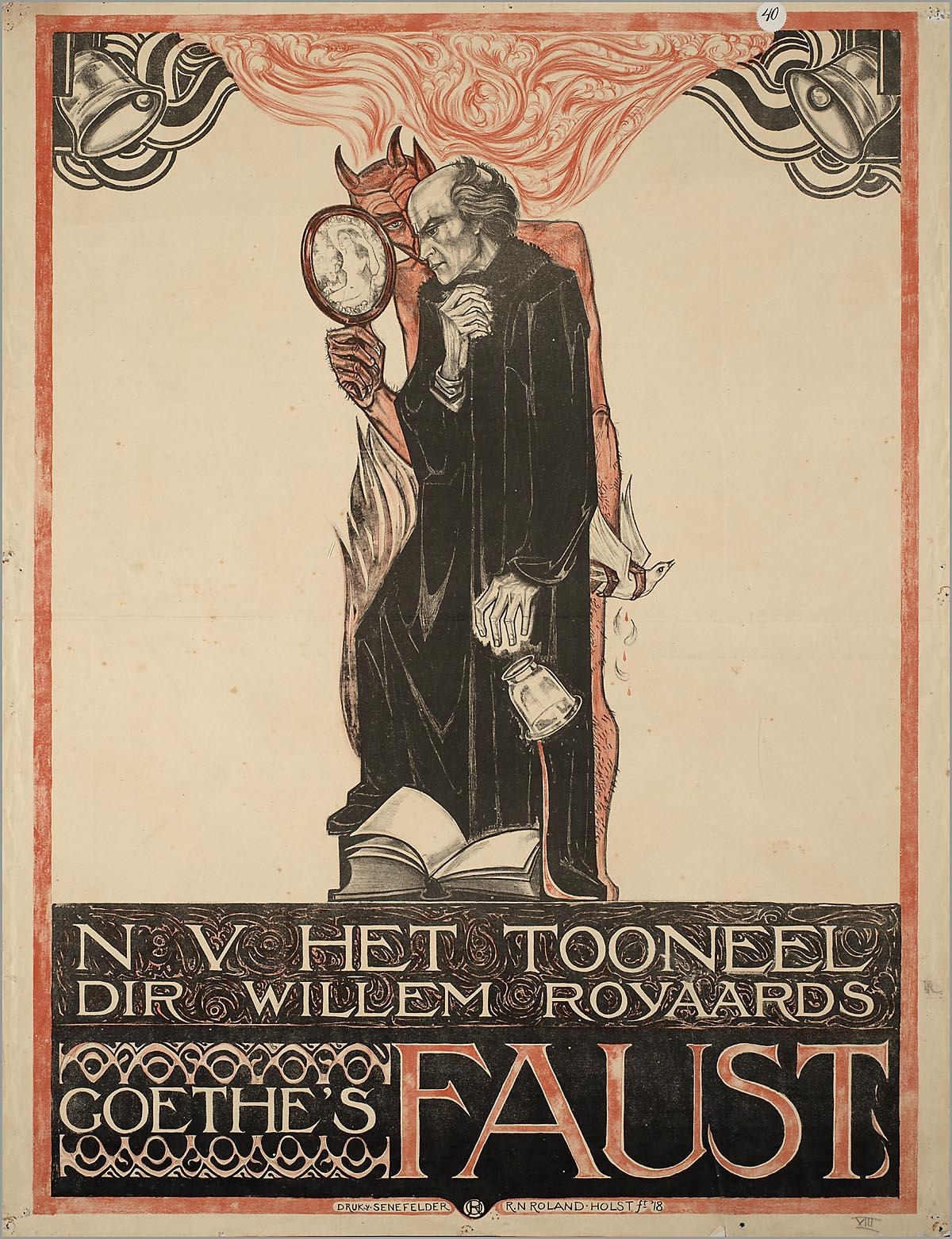 Affiche. "Goethe's Faust". N V Het Tooneel (Amsterdam). Dir. Willem Royaards.